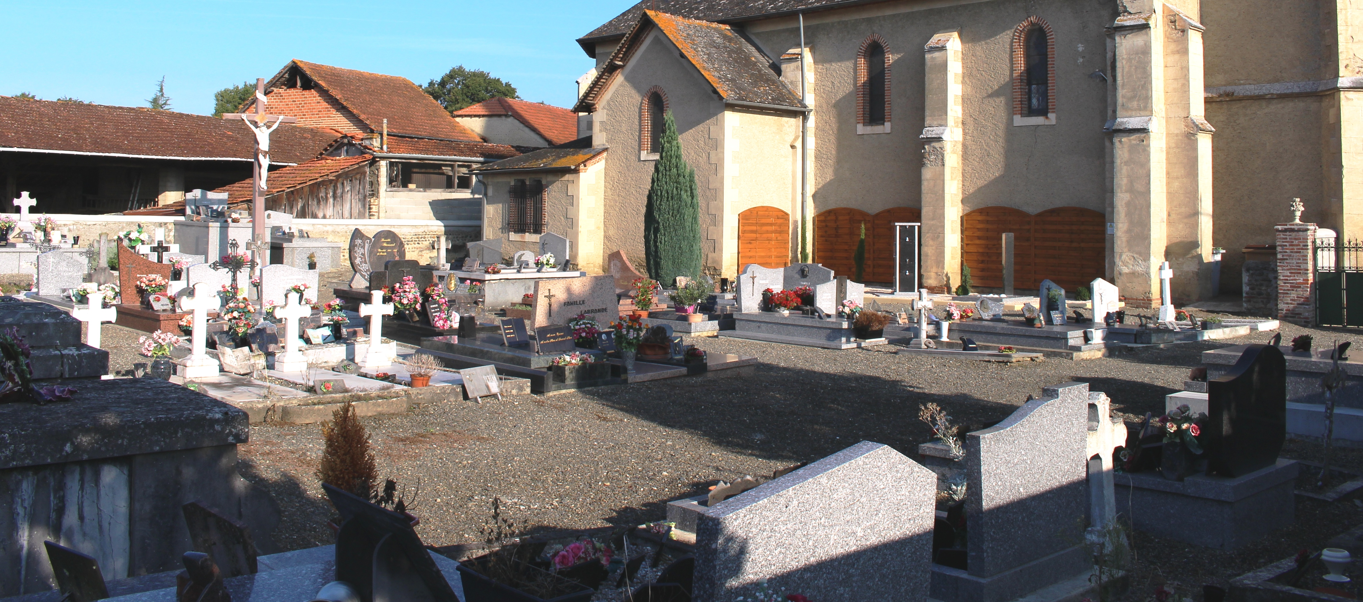 Cimetière de Nouilhan (Hautes-Pyrénées)